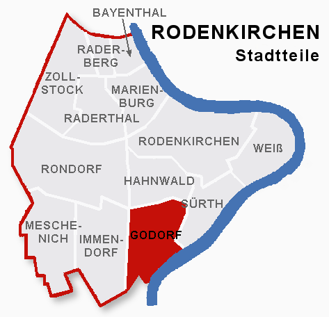 Lage des Stadtteils Godorf im Stadtbezik Rodenkirchen